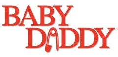 Logo von Babby Daddy